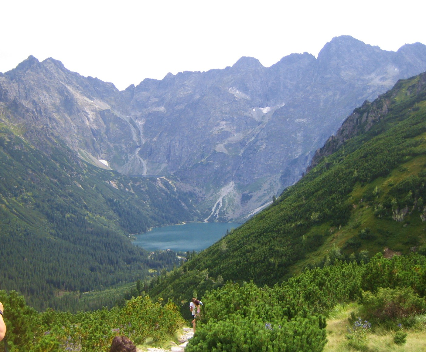 Morskie Oko ze szlaku przez Swistówkę